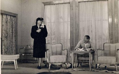 Herczeg Ferenc: Utolsó tánc. Nemzeti Színház. Bemutató: 1938.11.18. Rendező: Németh Antal. Szereplők: Özvegy Juricsánné: Szabó Margit, Kornéliusz mester: Petheő Attila.